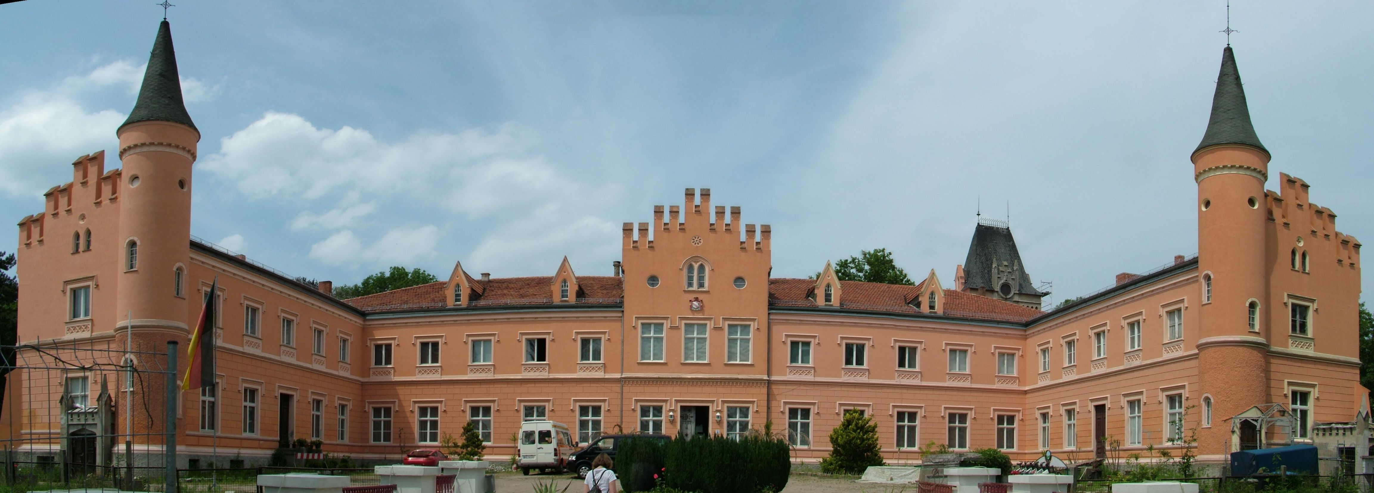 Gusow-Platkow in Brandenburg. Das Bild zeigt das Schloss Gusow, errichtet im Jahre 1870. Im Schloss sind heute ein Hotel und ein Museum.